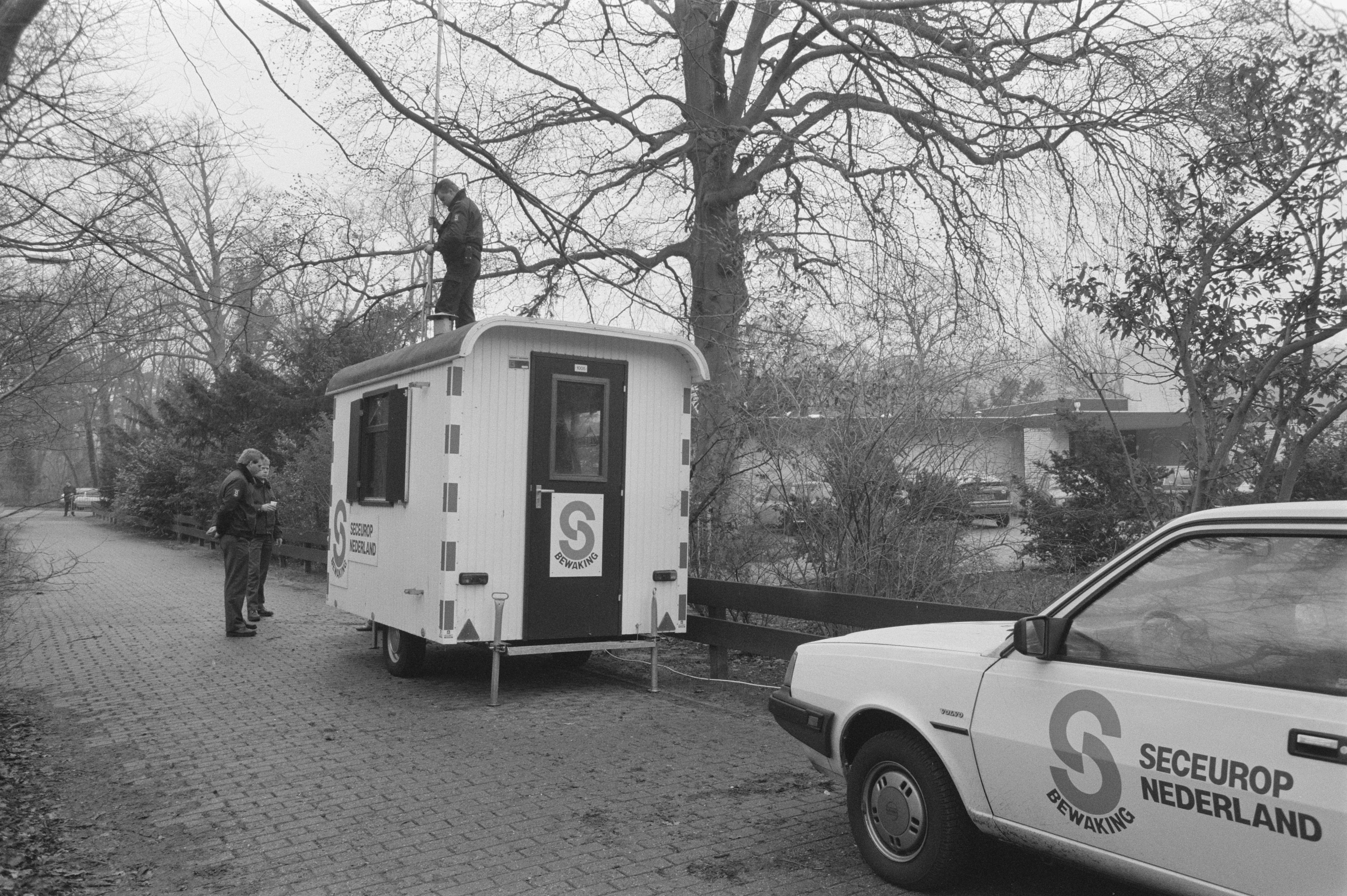 Collectie / Archief : Fotocollectie Anefo Reportage / Serie : [ onbekend ] Beschrijving : Bewakingsdienst bij de villa van de familie van Gerrit Jan Heijn in Bloemendaal Datum : 21 december 1987 Locatie : Bloemendaal, Noord-Holland Trefwoorden : bewakingsdiensten Fotograaf : Croes, Rob C. / Anefo Auteursrechthebbende : Nationaal Archief Materiaalsoort : Negatief (zwart/wit) Nummer archiefinventaris : bekijk toegang 2.24.01.05 Bestanddeelnummer : 934-1556